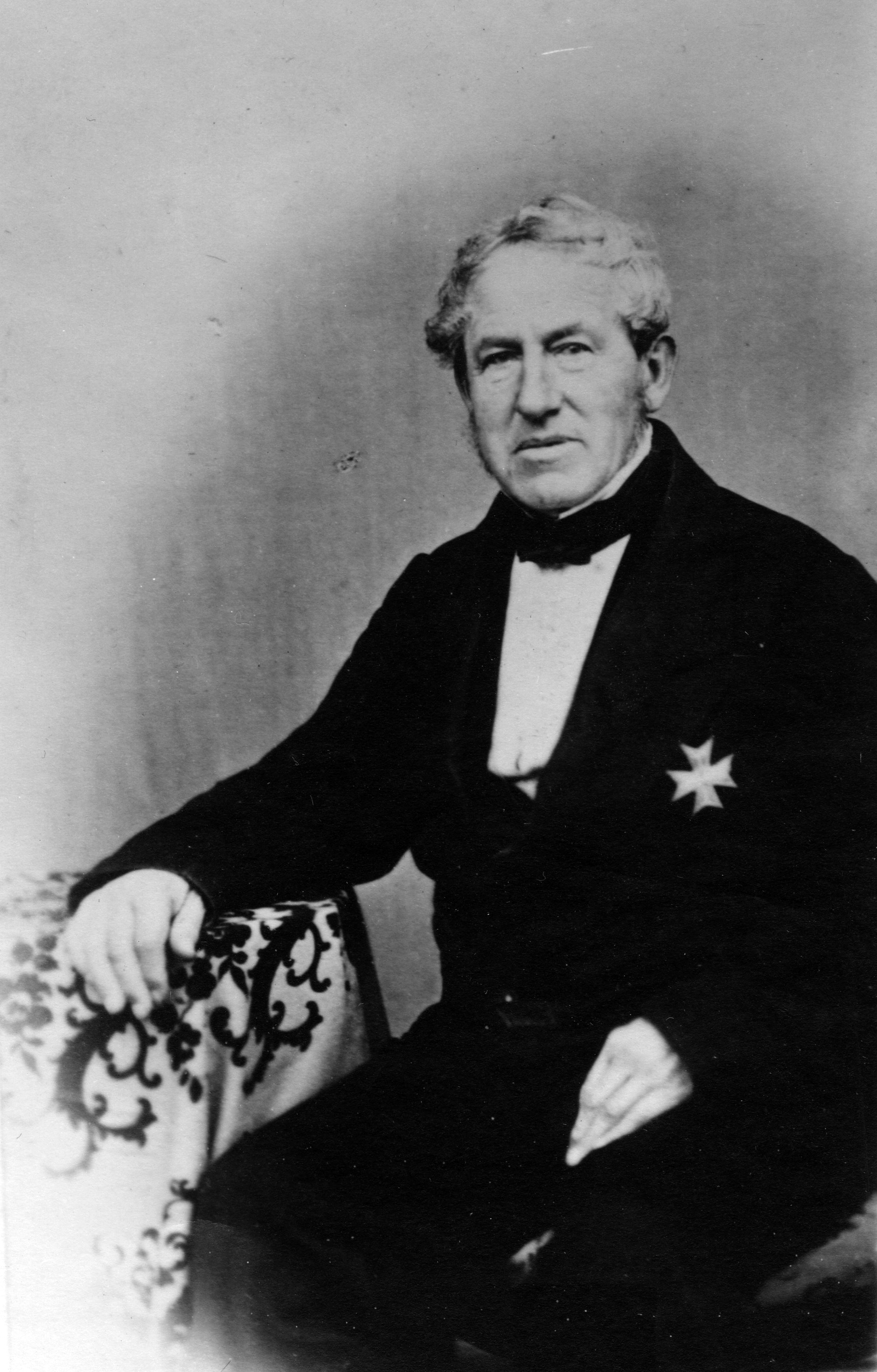 Format: Fotopositiv. Adam Johan Frederik Poulsen, greve av Trampe (født 10. september 1798 i København, død 8. august 1876 i Trondheim) var norsk jurist og embetsmann.